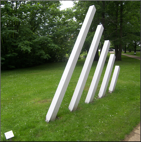 im Godewindpark, Travemünde/Germany